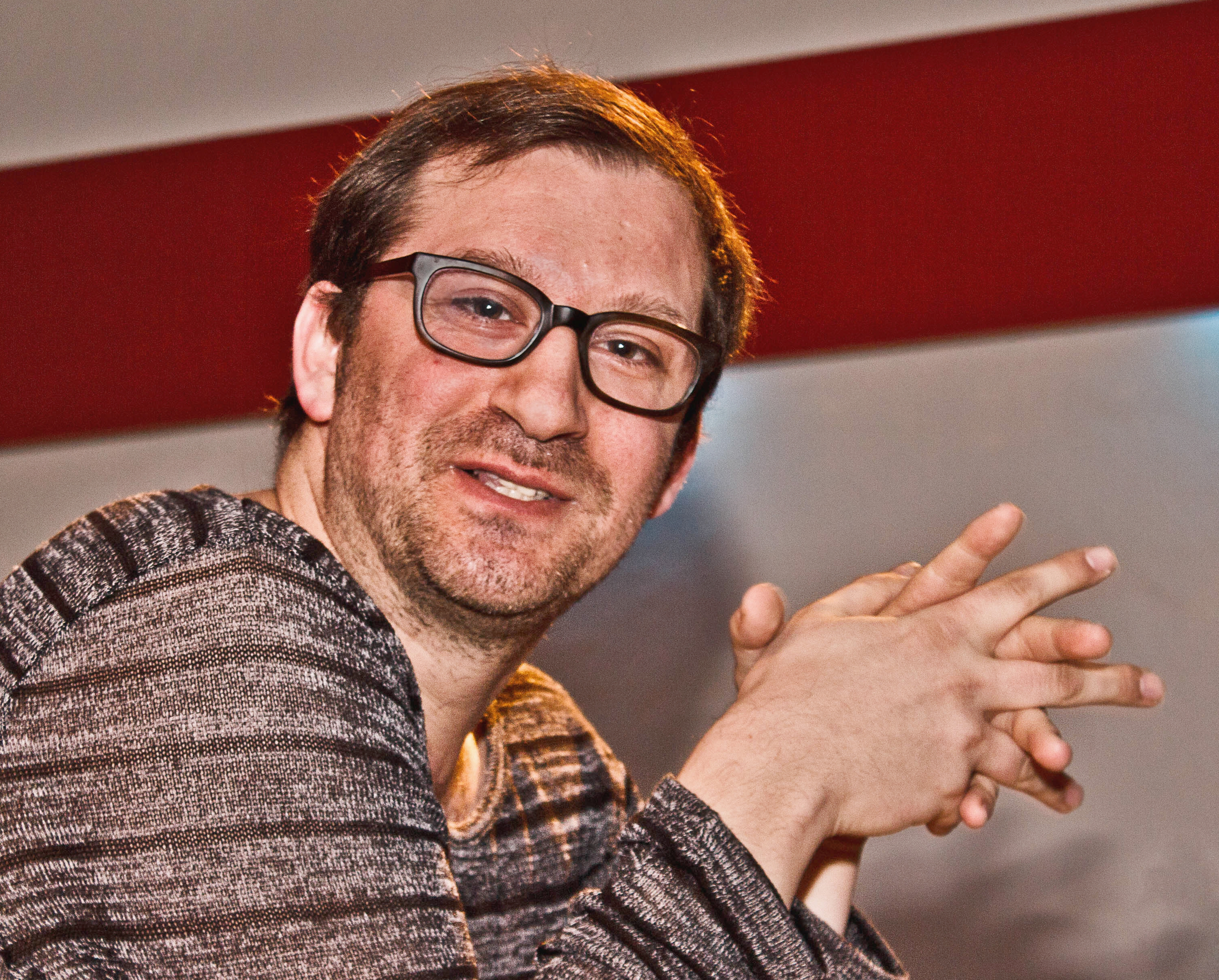 Jannis Plastargias (* 1975), griechisch-deutscher Diplom-Pädagoge, Kulturaktivist, Autor und Blogger; hier bei einer Autorenlesung in der Kultureinrichtung Interkulturelle Bühne in Frankfurt-Bornheim. (Aufnahmedatum: 20.3.2013; Ort: Interkulturelle Bühne, Frankfurt am Main; Foto: Corinna Kaiser (CocoUniVersum))